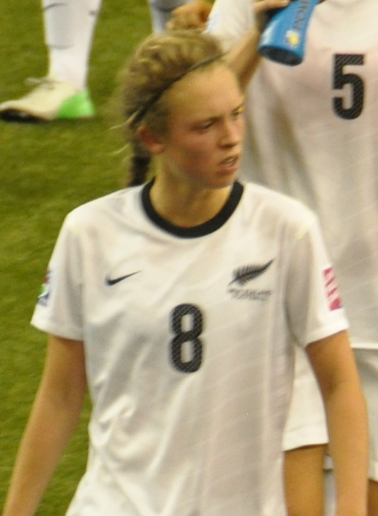 Coupe du monde féminine FIFA U-20